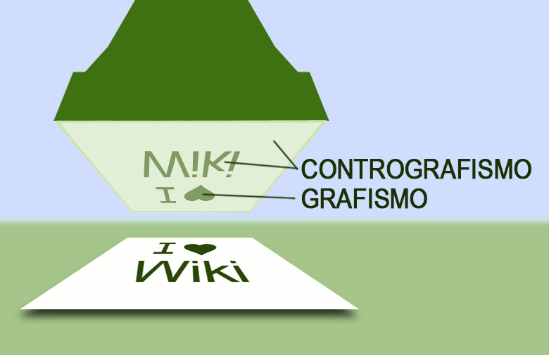 CONTROGRAFISMO